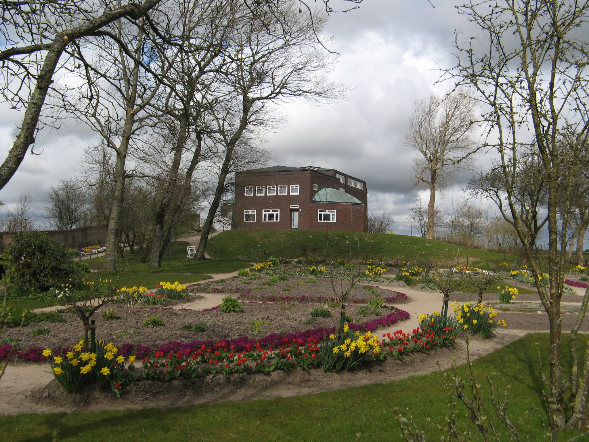 Seebüll Author: Dirk Ingo Franke